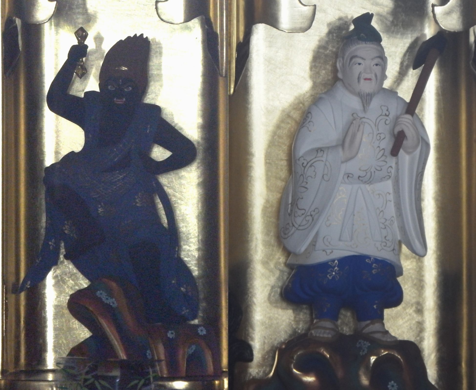 蔵王権現と双羽権現